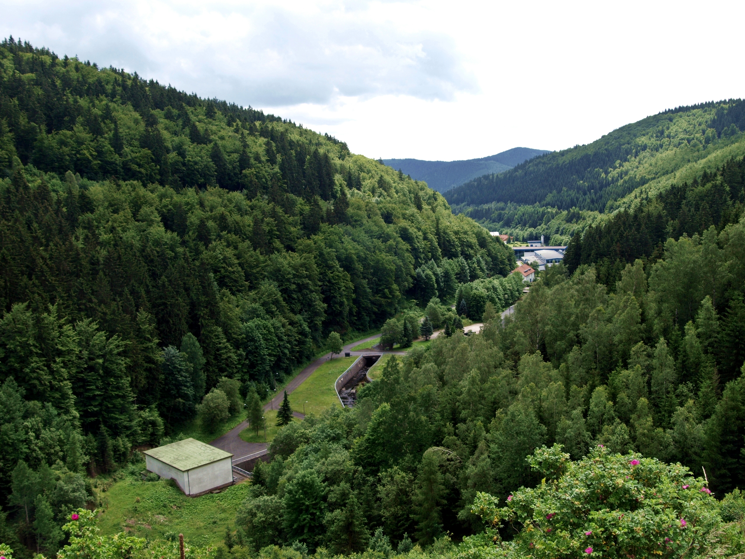 Blick von der Talsperre auf Schönbrunn bei Frauenwald / Rennsteig / Thüringer Wald